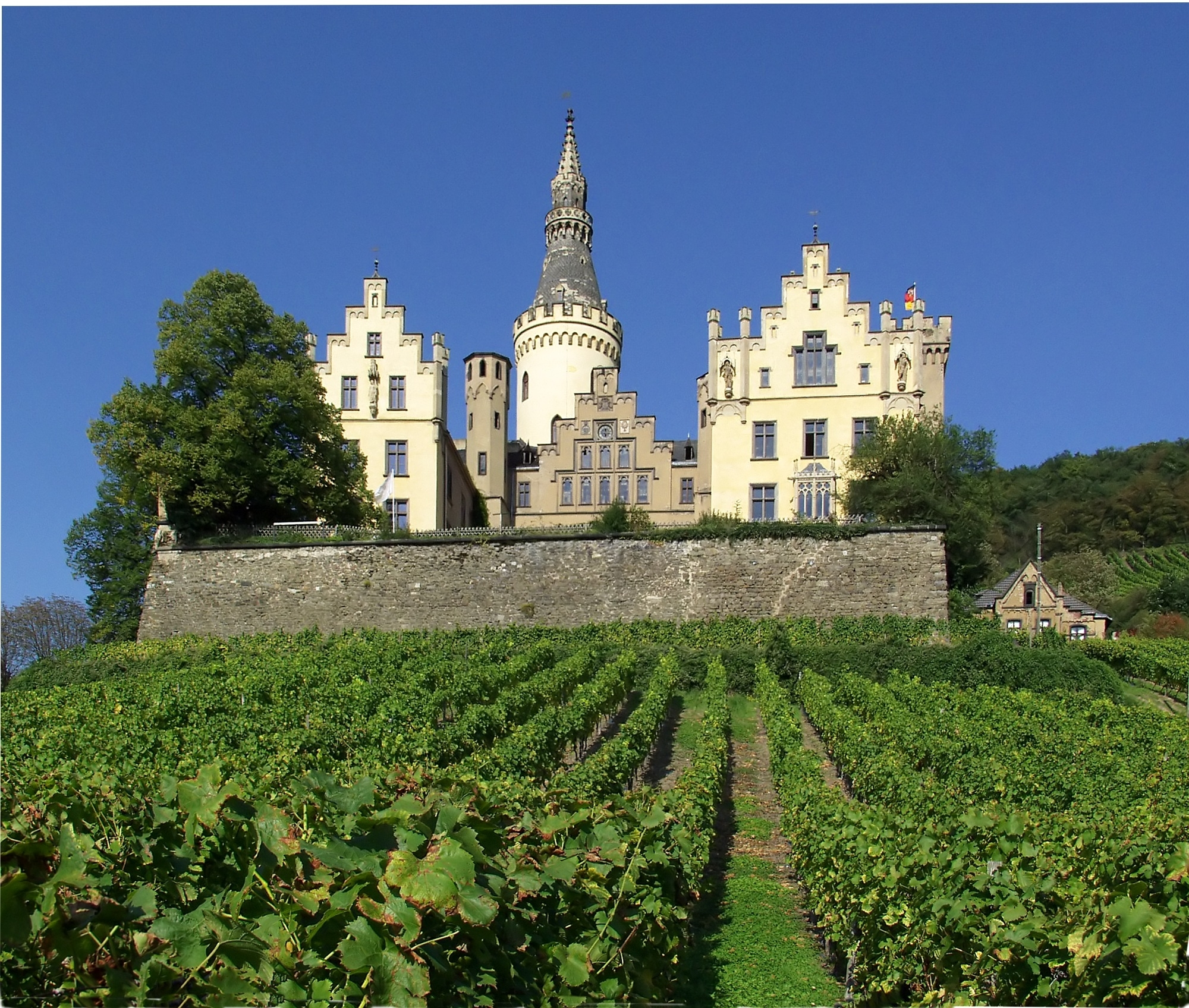 Südansicht von Schloss Arenfels, mit vorgelagertem Weinberg, Bad Hönningen